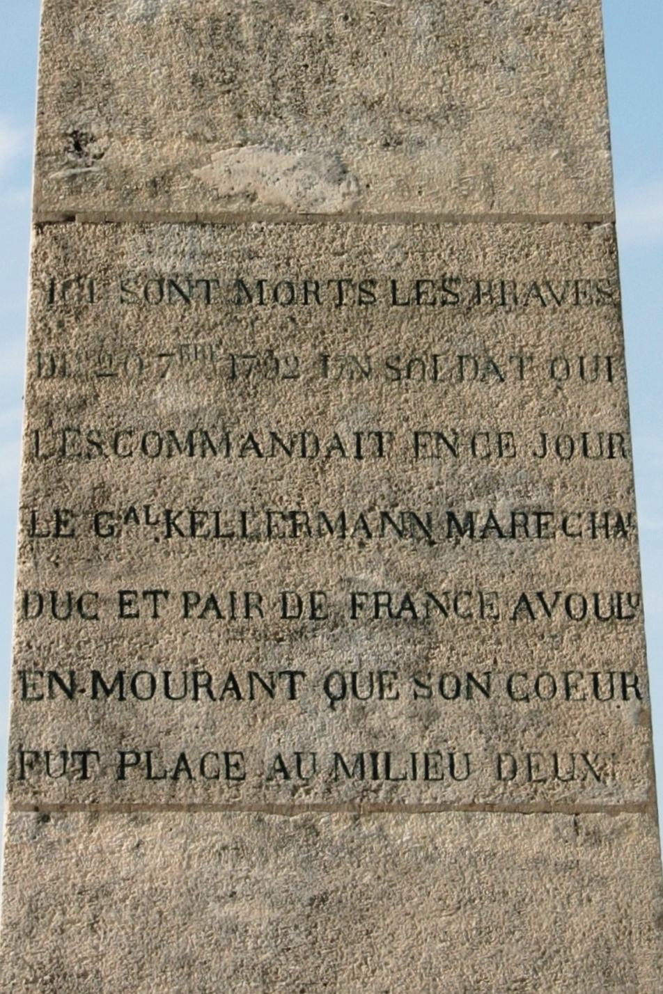 Schrëft um Obelisk virum Kellermann senger Statu.